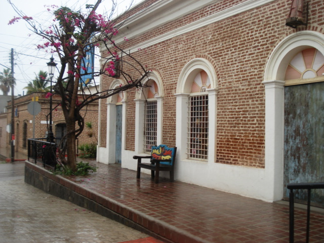 Edificios